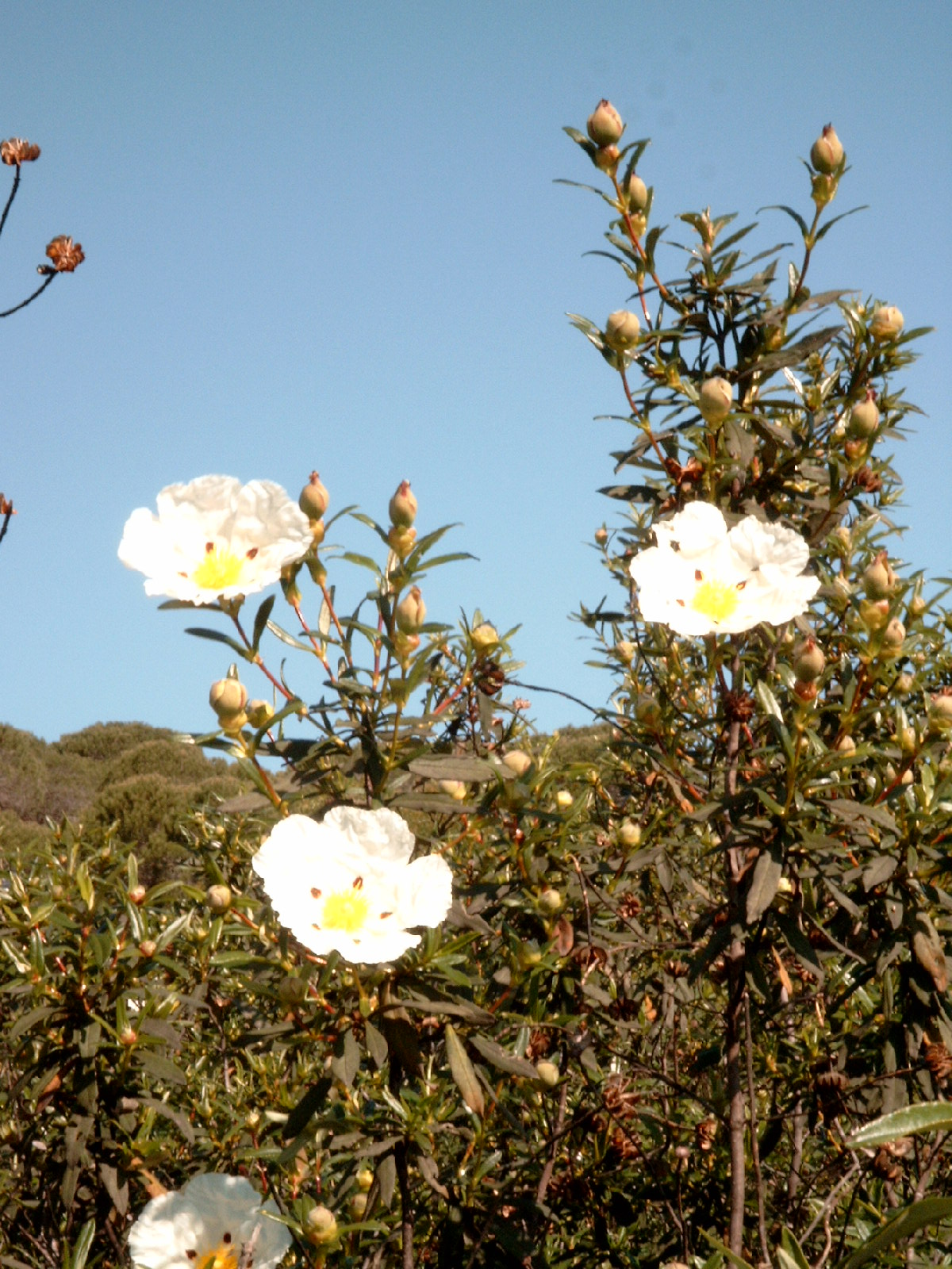 Name Cistus ladanifer Familiy Cistaceae